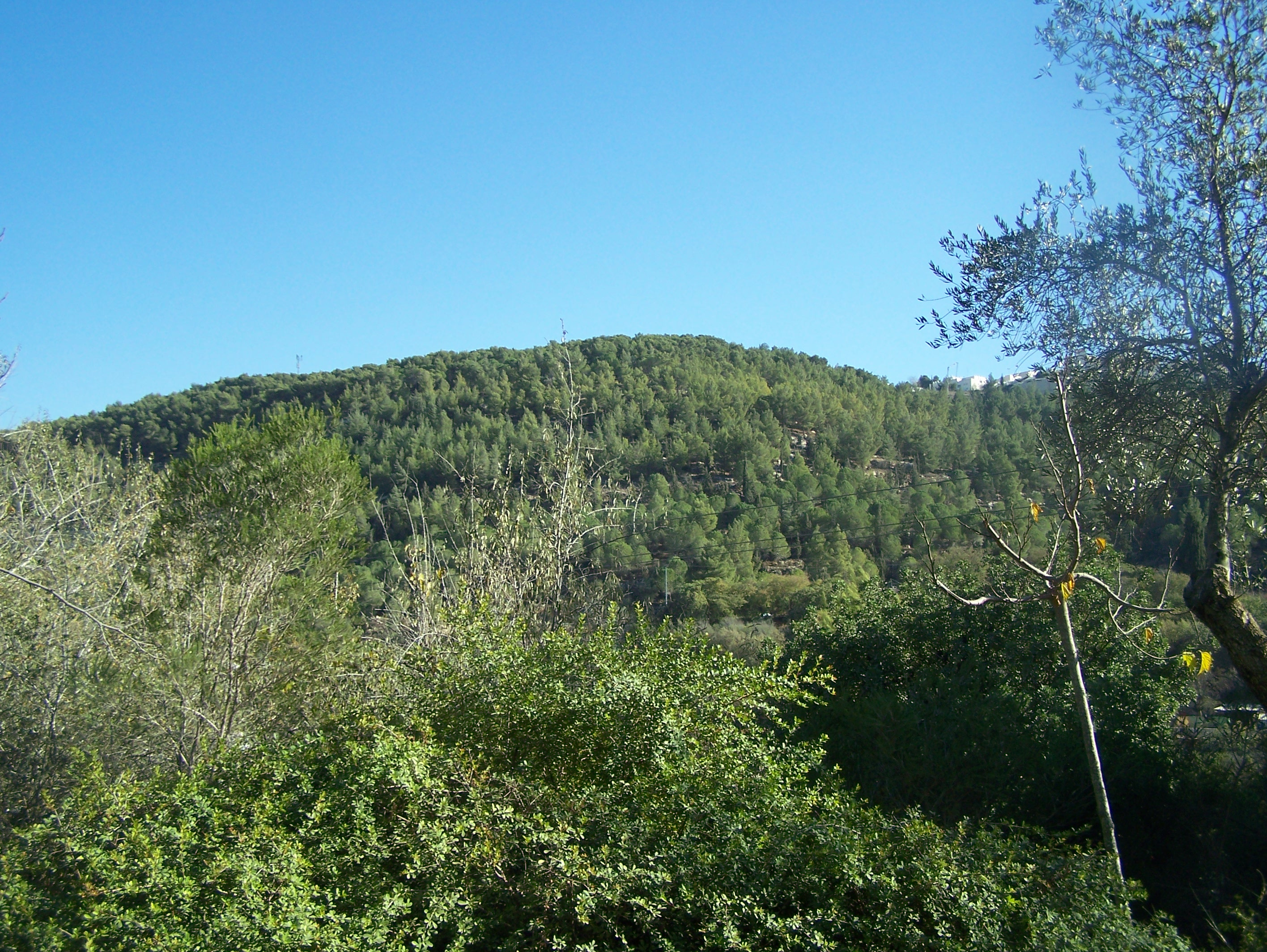 נוף של חורש ים תיכוני, נשקף מתוך גן החיות התנכ"י בירושלים.